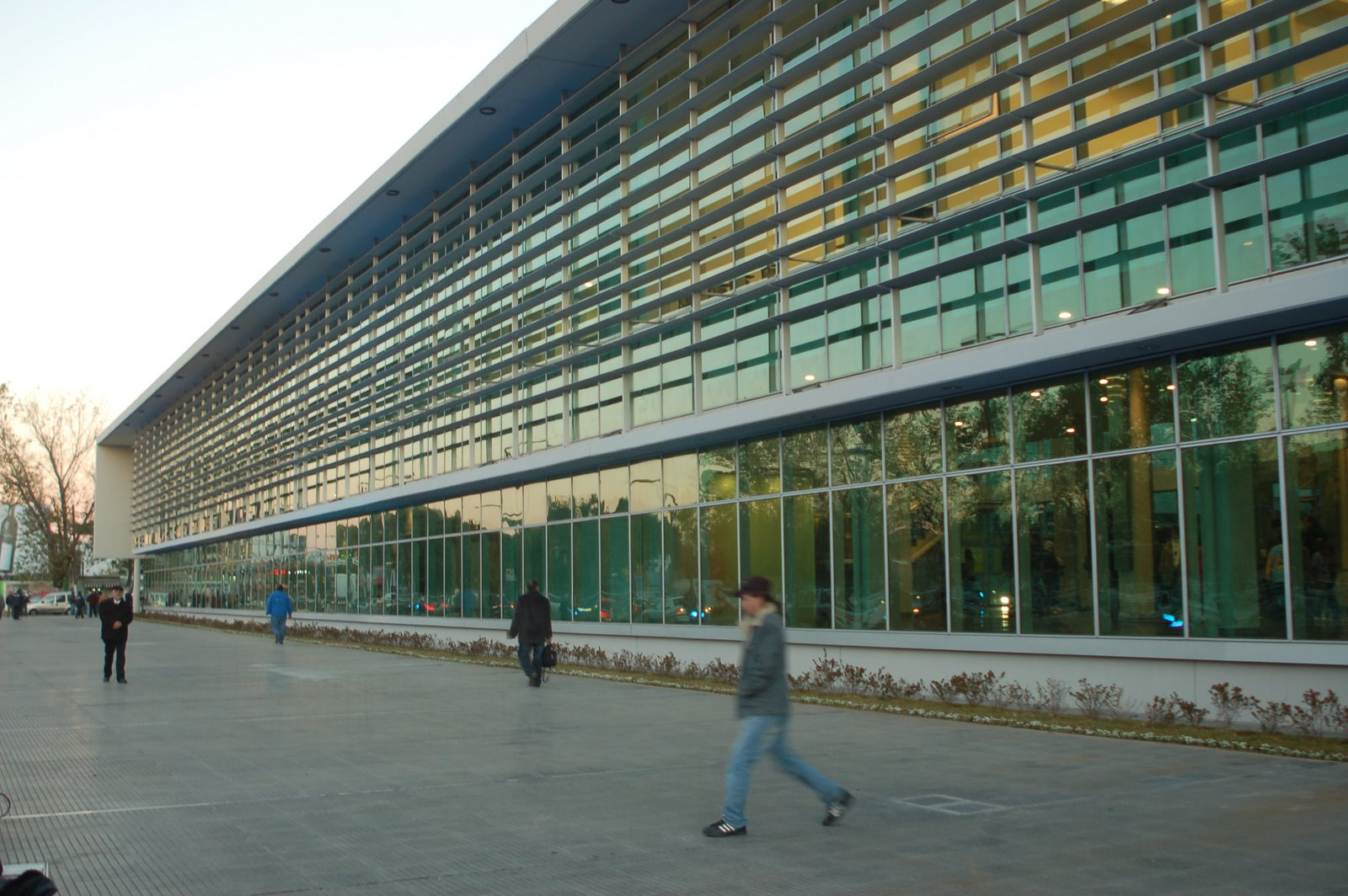 Fachada del edificio del nuevo Hospital de Emergencias "Clemente Álvarez" (HECA) de la Ciudad de Rosario, Santa Fé, Argentina.